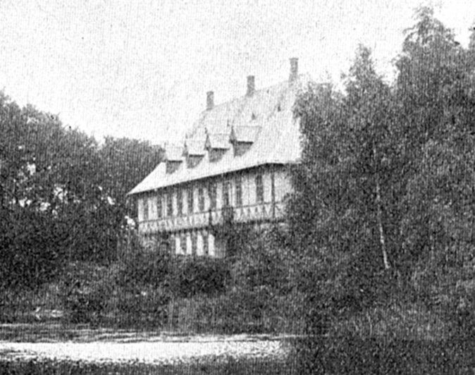 Fraugdegård er en gammel Sædegård, som nævnes første gang i 1397. Gården ligger i Fraugde Sogn, Åsum Herred, Odense Kommune. Hovedbygningen er opført i 1588 og ombygget i 1769.